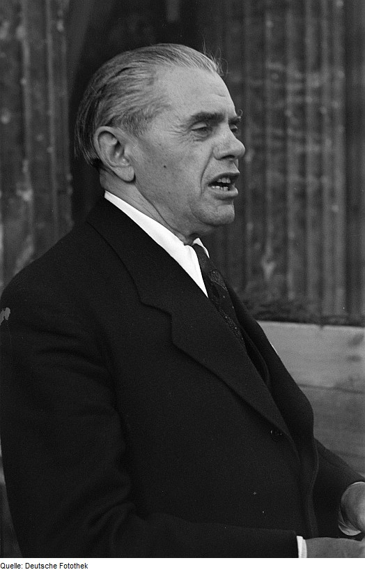 Original image description from the Deutsche Fotothek Ottomar Geschke spricht